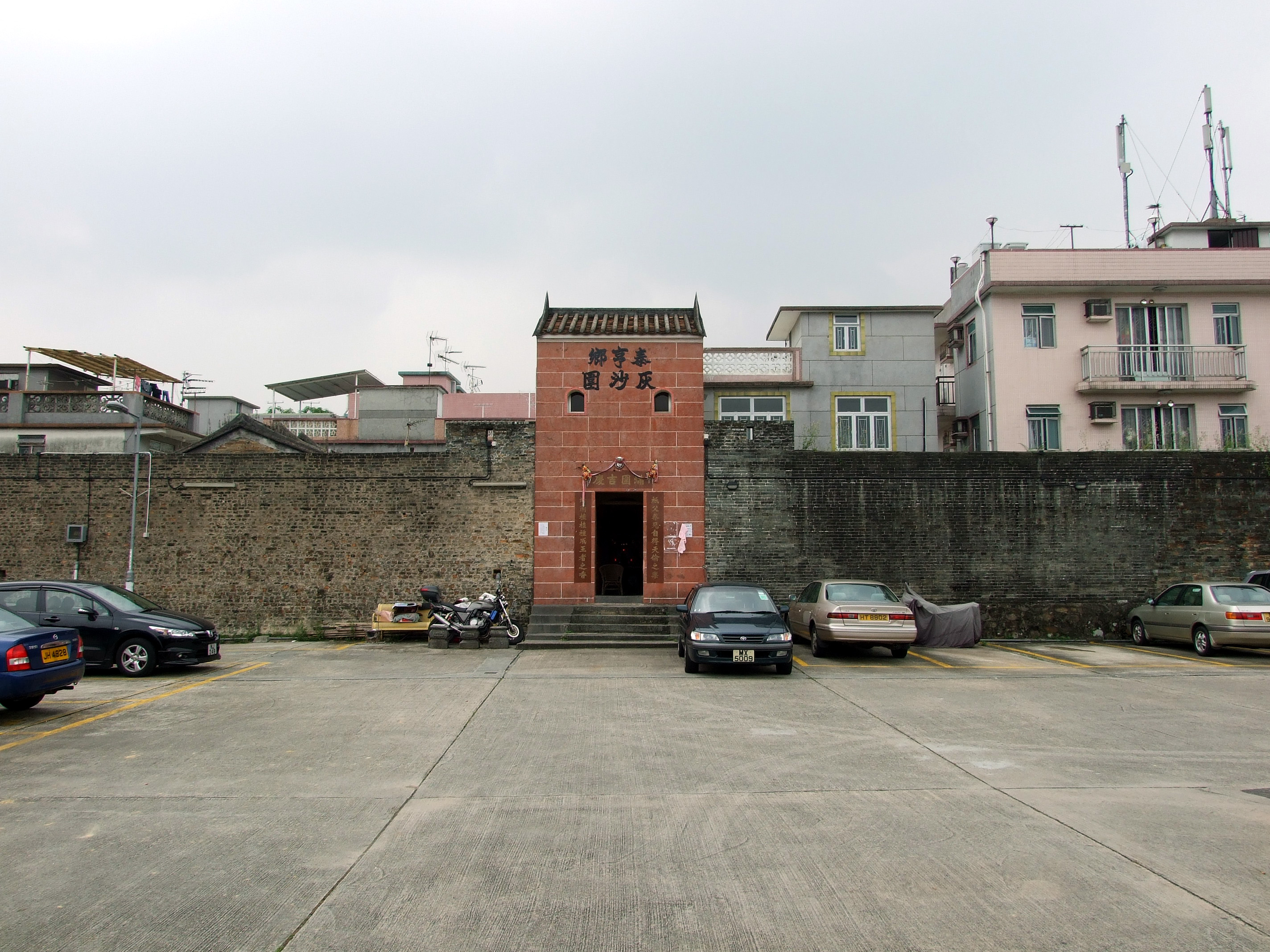 灰沙圍 Entrance Gate, Fui Sha Wai, Tai Hang Heung, Tai Po, N.T.